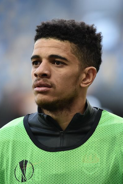 Шахтер — Севилья. Накануне